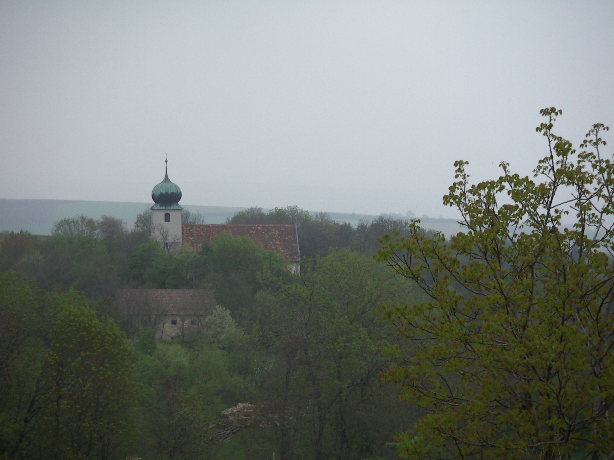 Pfarrkirche Herrnleis